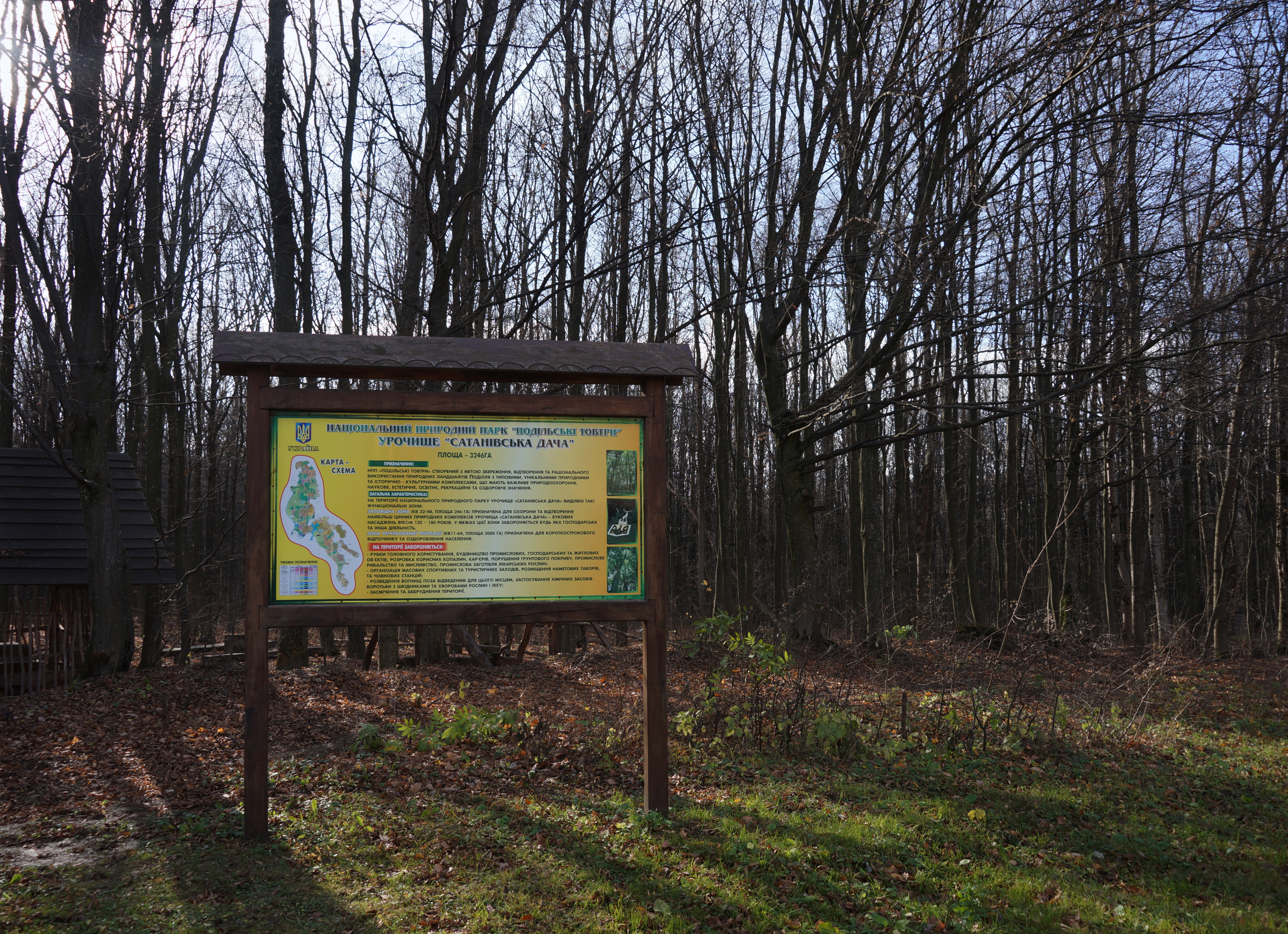 Сатанівський, Городоцький район, Сатанівське л-во кв. 21, 22, 24, 25, 27, 28, 29, 31-33, 35-37, 40,41, 43, 44, 46, 47-49,51, 53, 55-59, 61, 63, 64